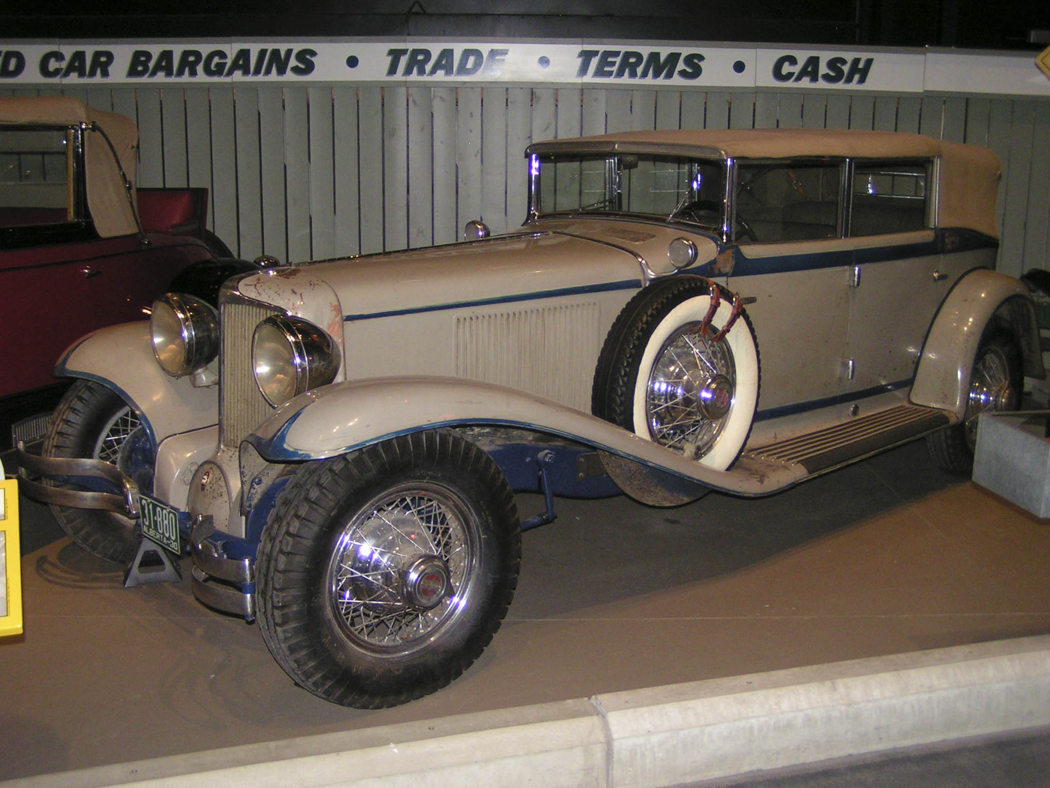 1930 Cord L29